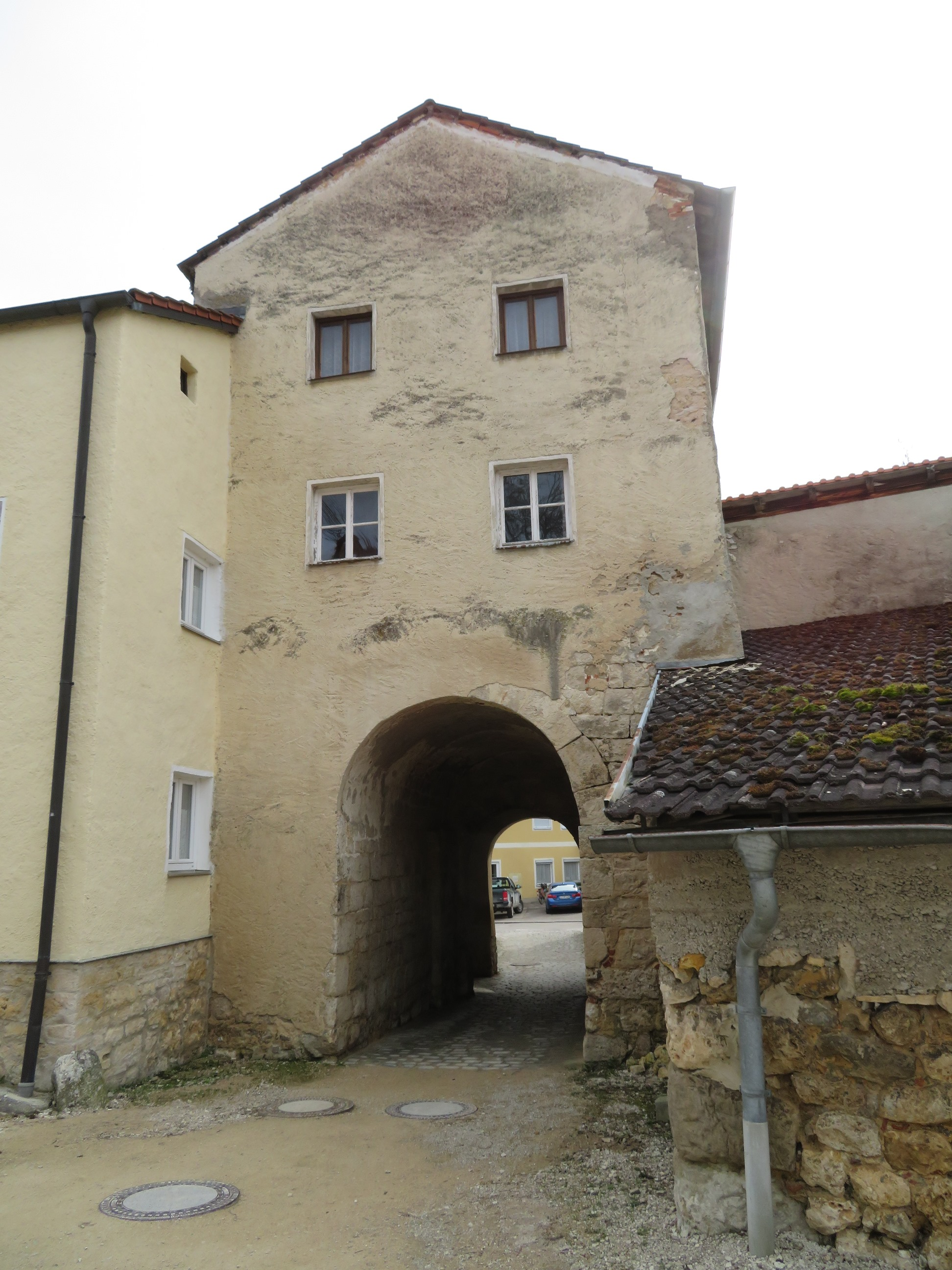 Tor beim Altmühlzentrum